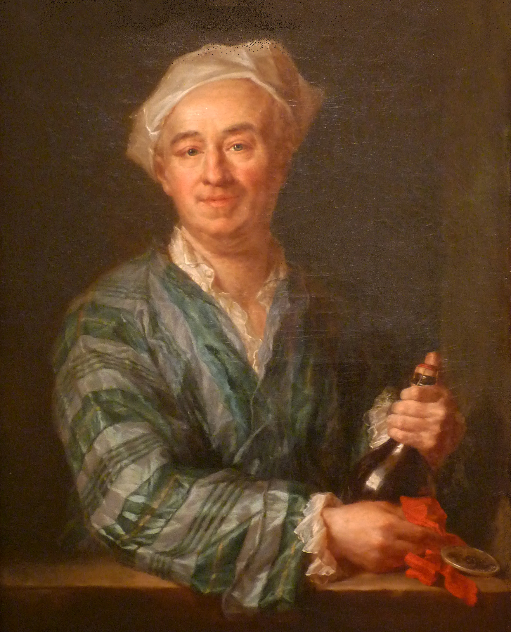 Jean Grimou (1678-1733), Le Buveur de champagne (Musée des beaux-arts de Reims)